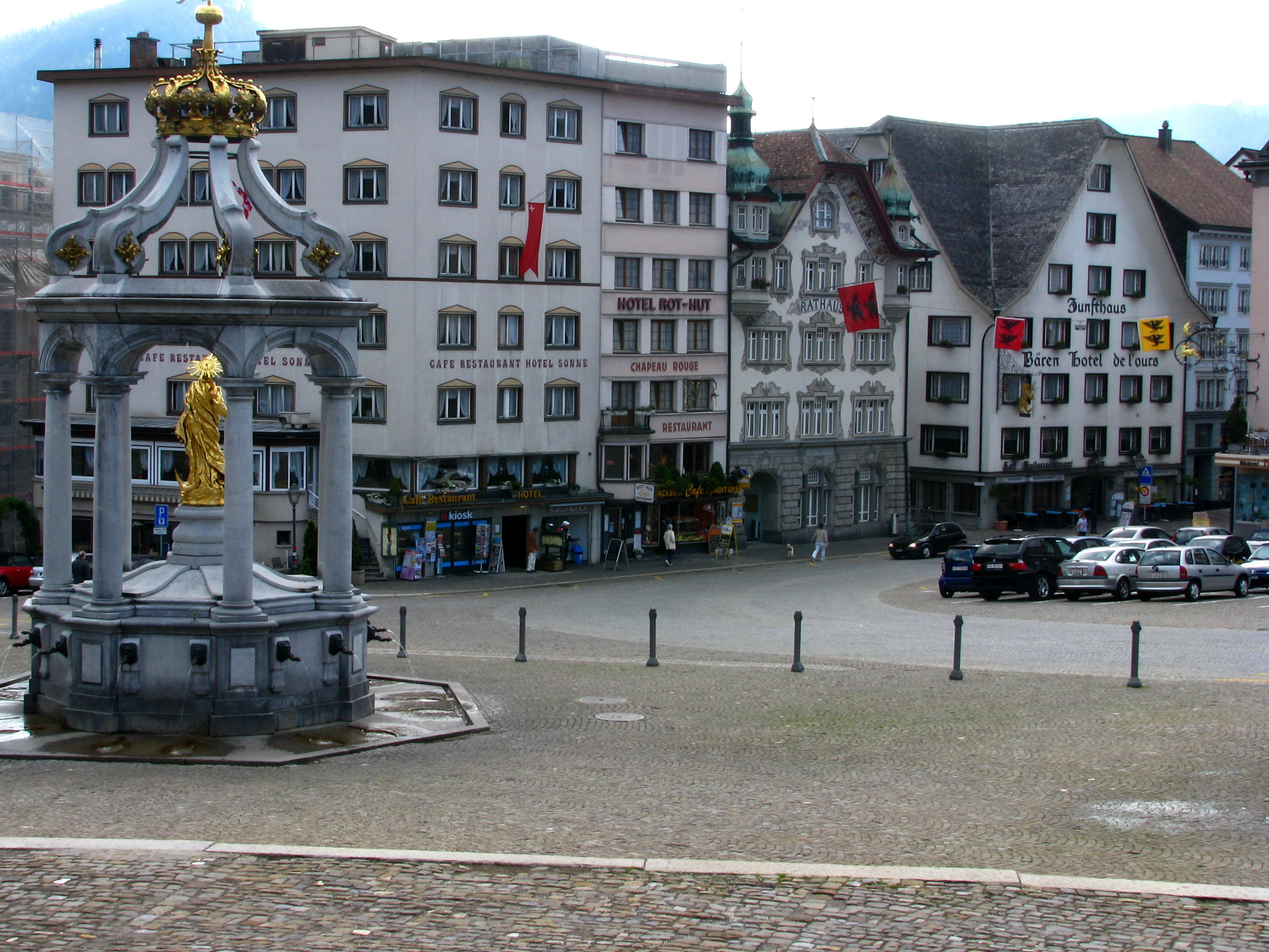 Einsiedeln (SZ) in Switzerland, Marienbrunnen to the left